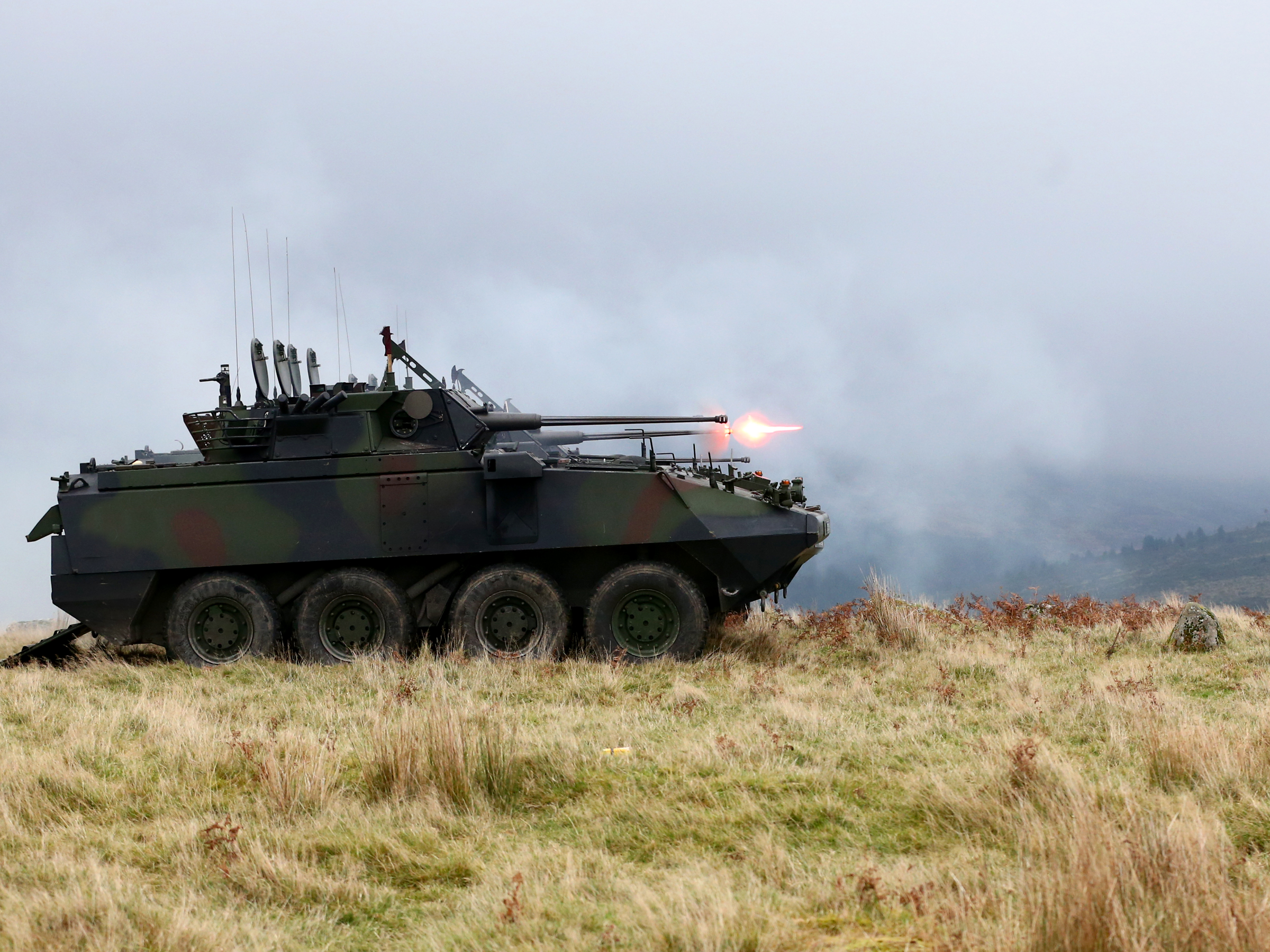 Cav Shoot Glen of Imaal